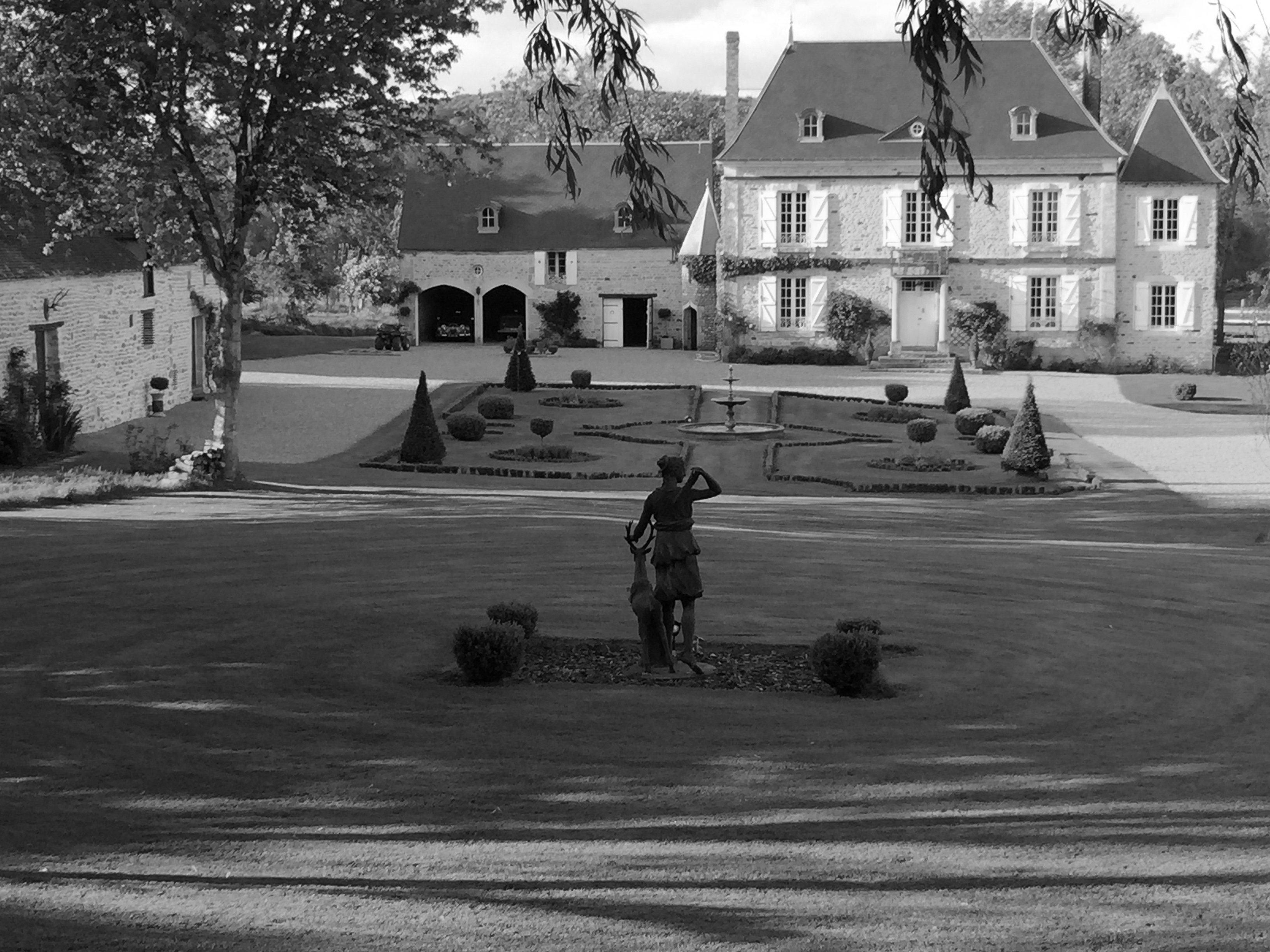 facade GR sud vue bois